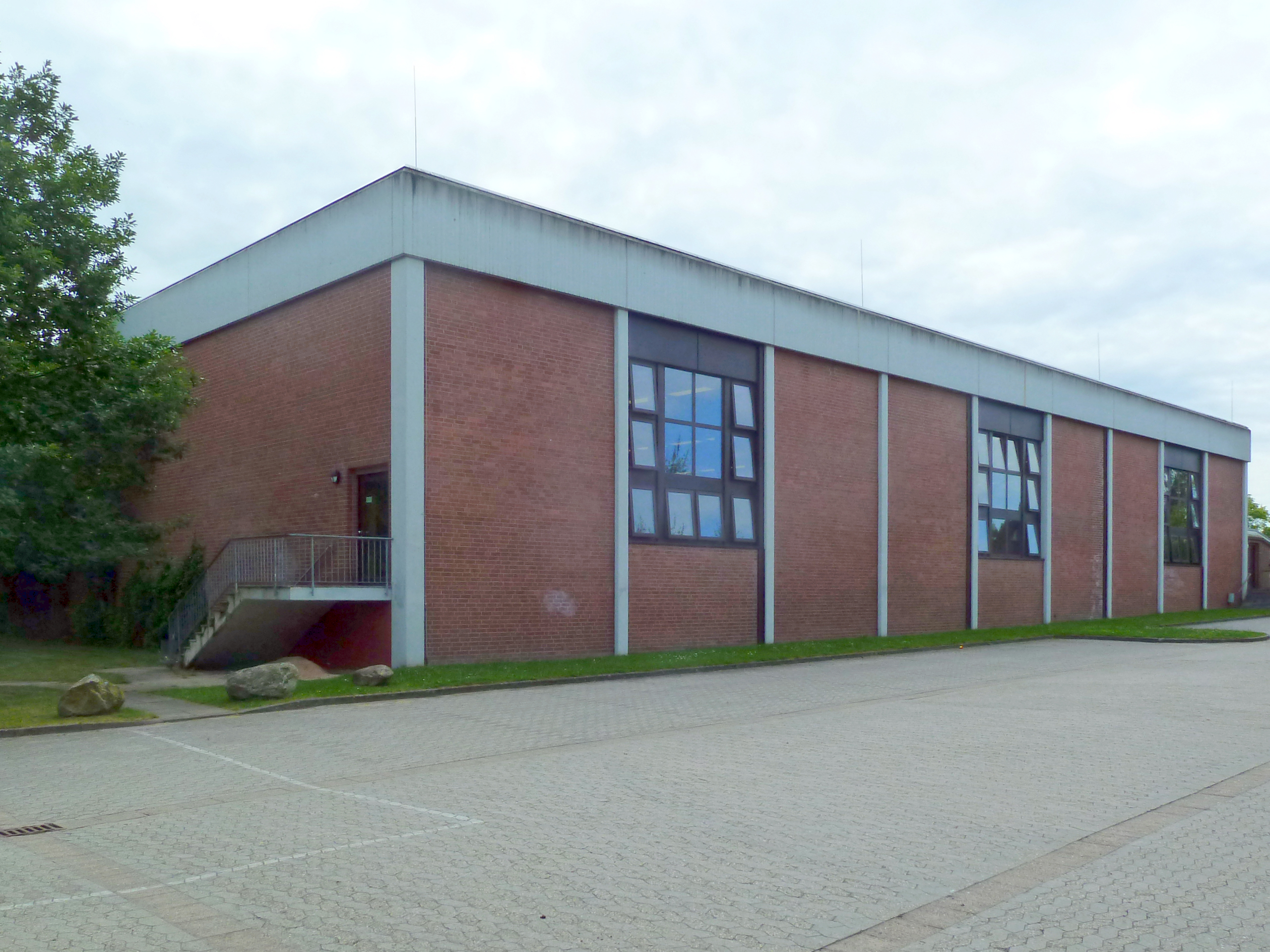 Turnhalle der Kooperativen Gesamtschule Schneverdingen in Schneverdingen in Niedersachsen (Deutschland).